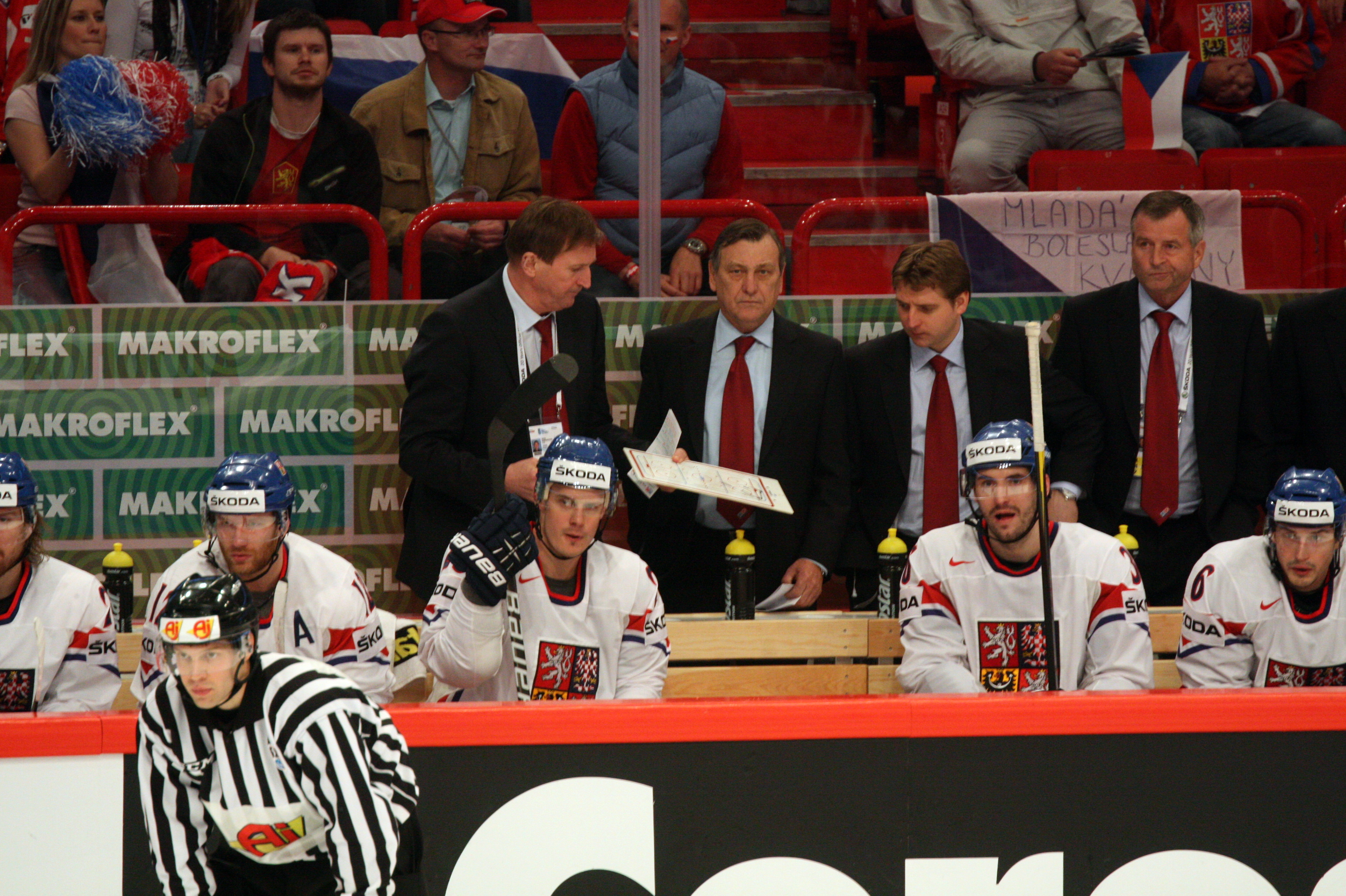 Сборная Чехии по хоккею, ЧМ 2012, 13.05.2012 Россия-Чехия, Стокгольм, Швеция.